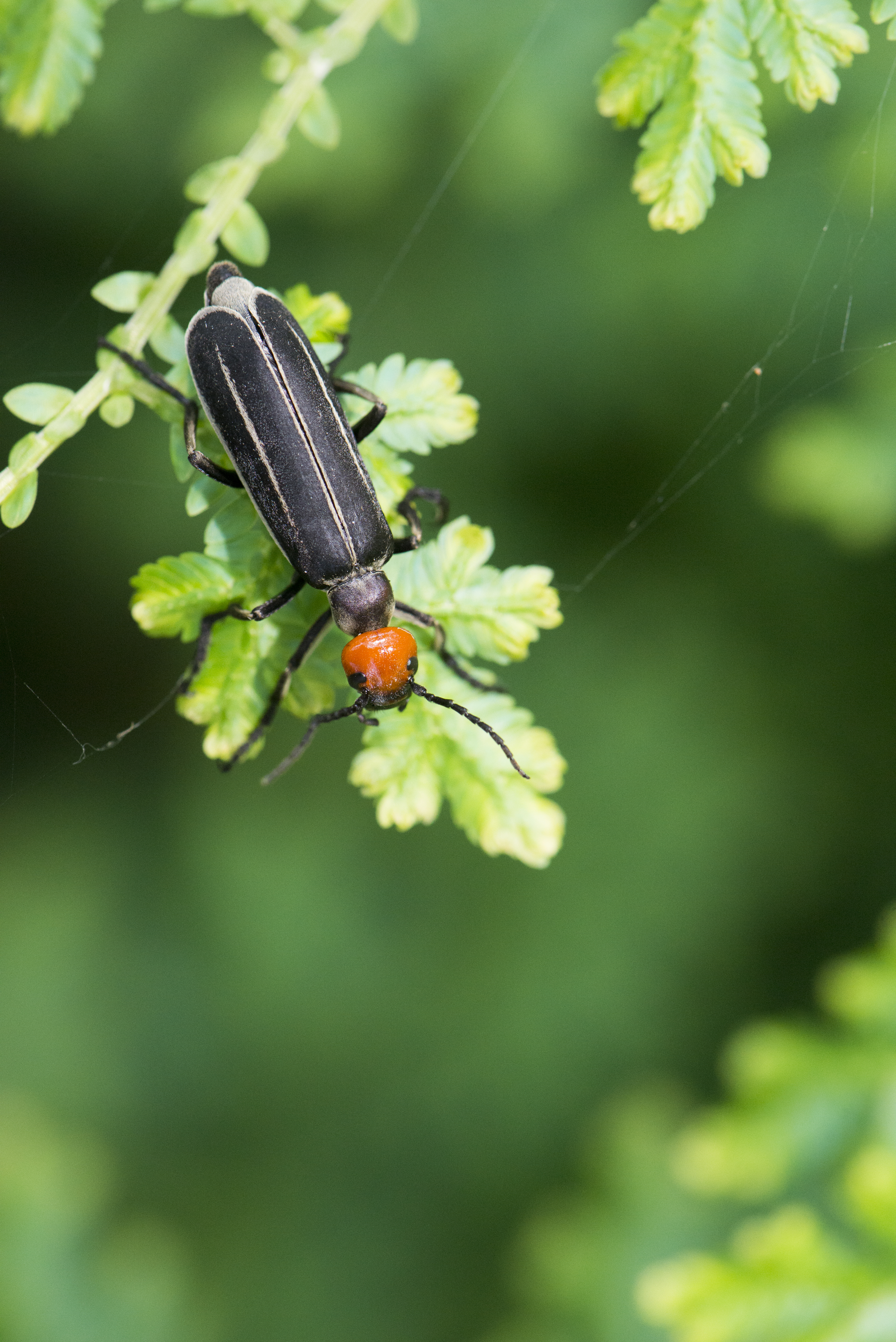 Epicauta waterhousei (Haag-Rutenburg, 1880) 白條豆芫青